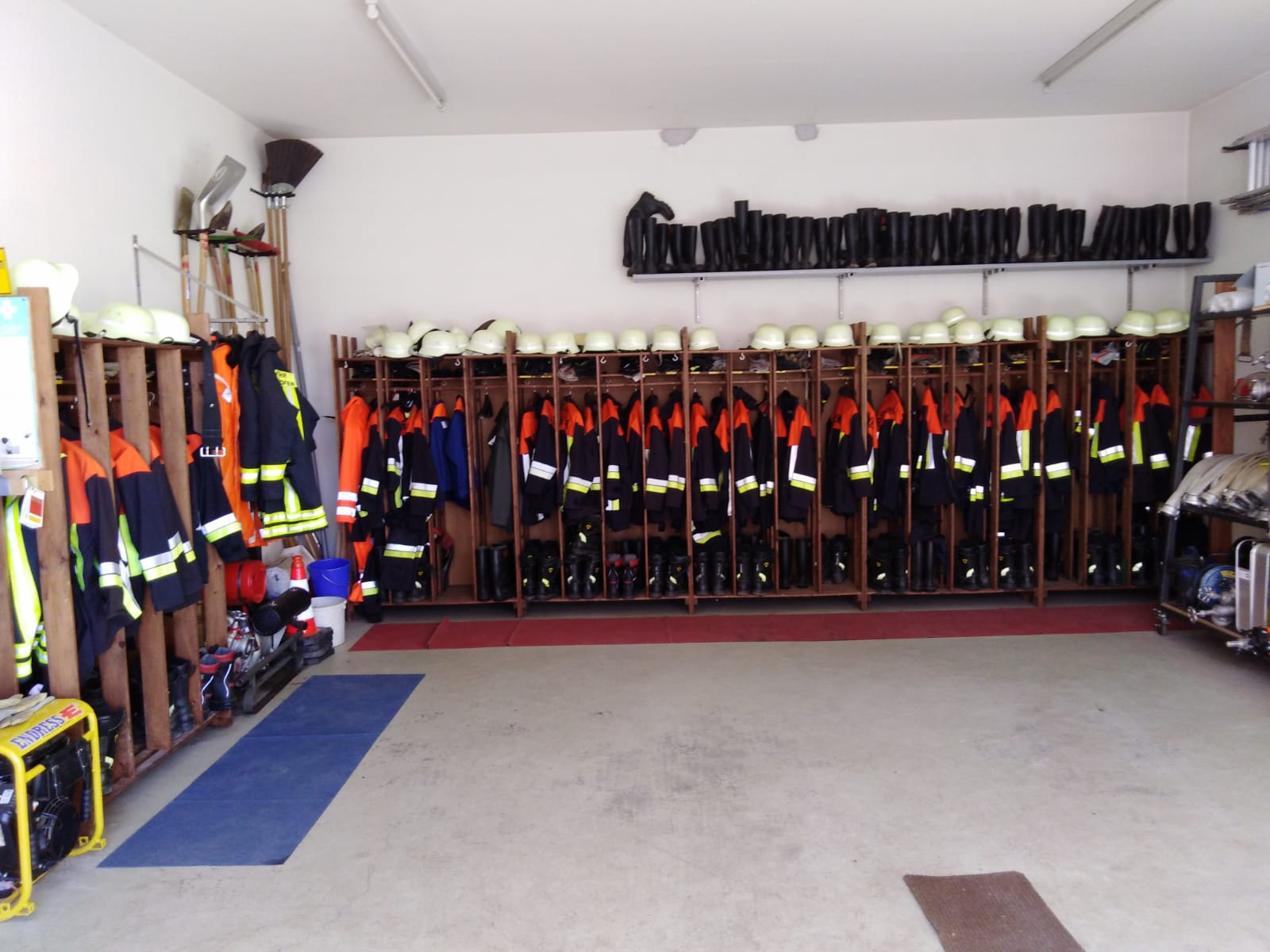 Feuerwehrgerätehaus der Freiwilligen Feuerwehr Wollmetshofen